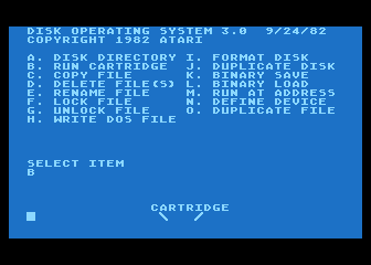 Менюто на DOS 3.0